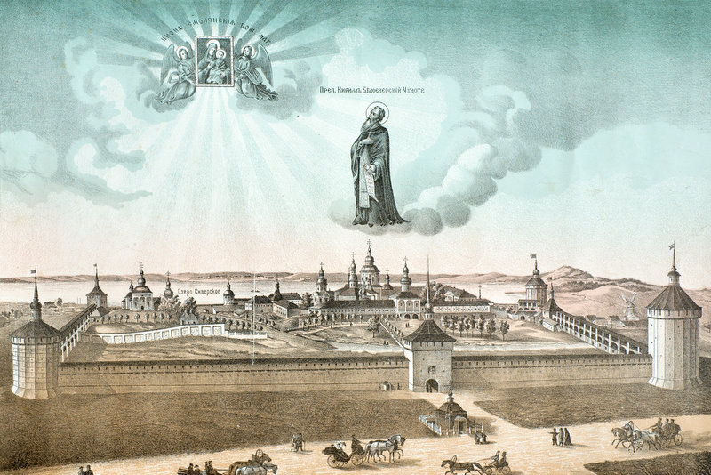 Центральная часть цветной хромолитографии «Вид первоклассного Кирилло-Белозерского монастыря в память пятисотлетия основания его». 1897г. В центральной части листа - монастырский ансамбль на берегу Сиверского озера, вверху - образ преподобного Кирилла Белозерского с иконой Богородицы Одигитрии. Внизу - надпись: «От Санкт-Петербургского духовного цензурного комитета печатать дозволяется. Санкт-Петербург 18-го апреля 1897 года». Размер хромолитографии: 32,5x43,5 см. Хранится в Кирилло-Белозерском музее